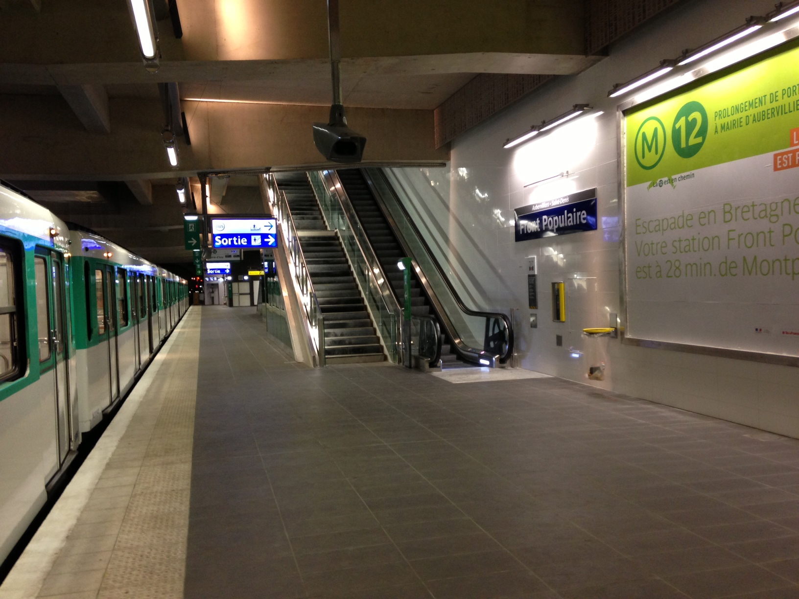 A la station de métro Front Populaire, le quai direction porte de la Chapelle.